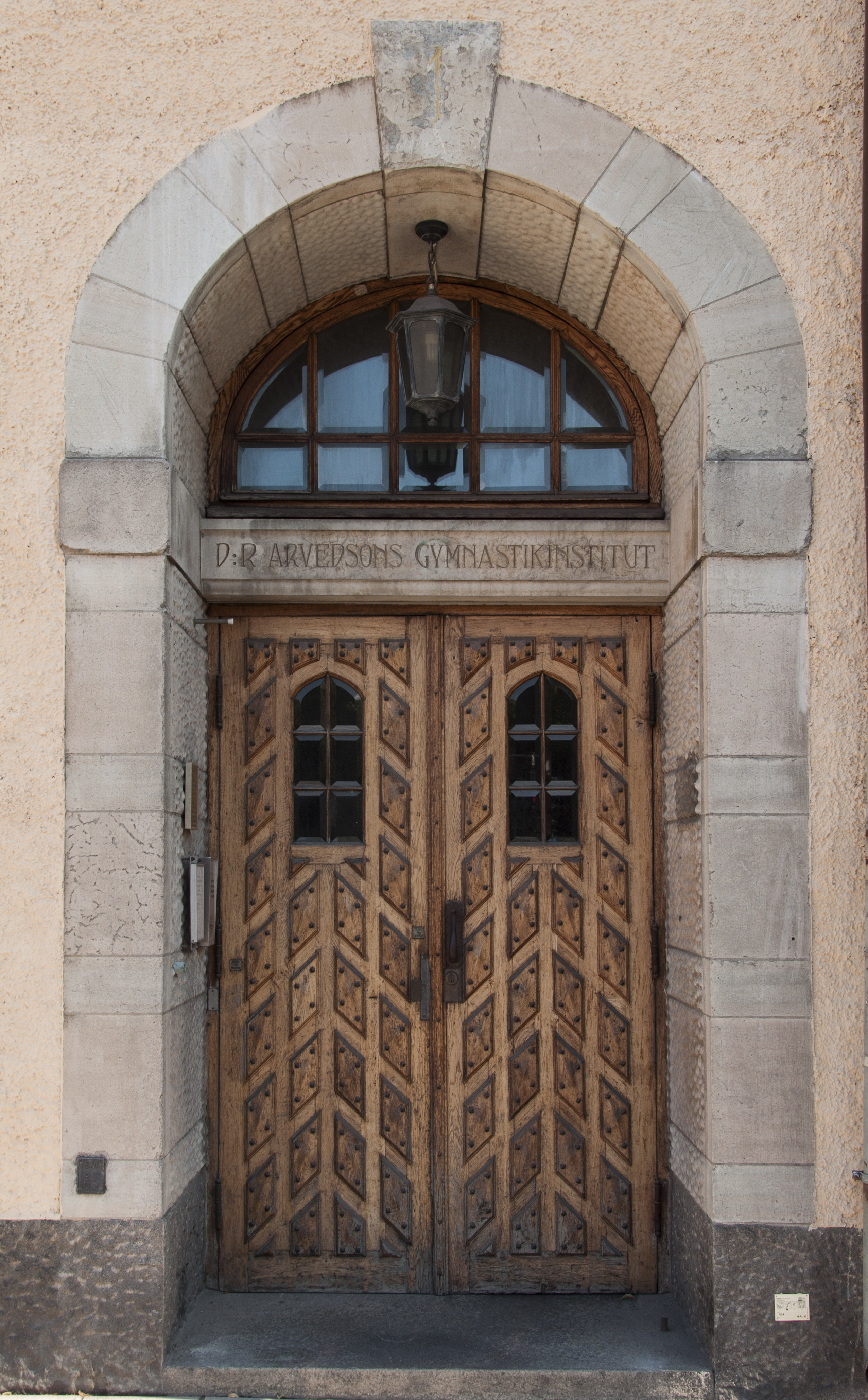 Tofslärkan 8, Nybyggnadsår 1909 - 1911, Albin Brag (Arkitekt) Georg Hesselman (Byggmästare) Johan Arvedson (Byggherre)